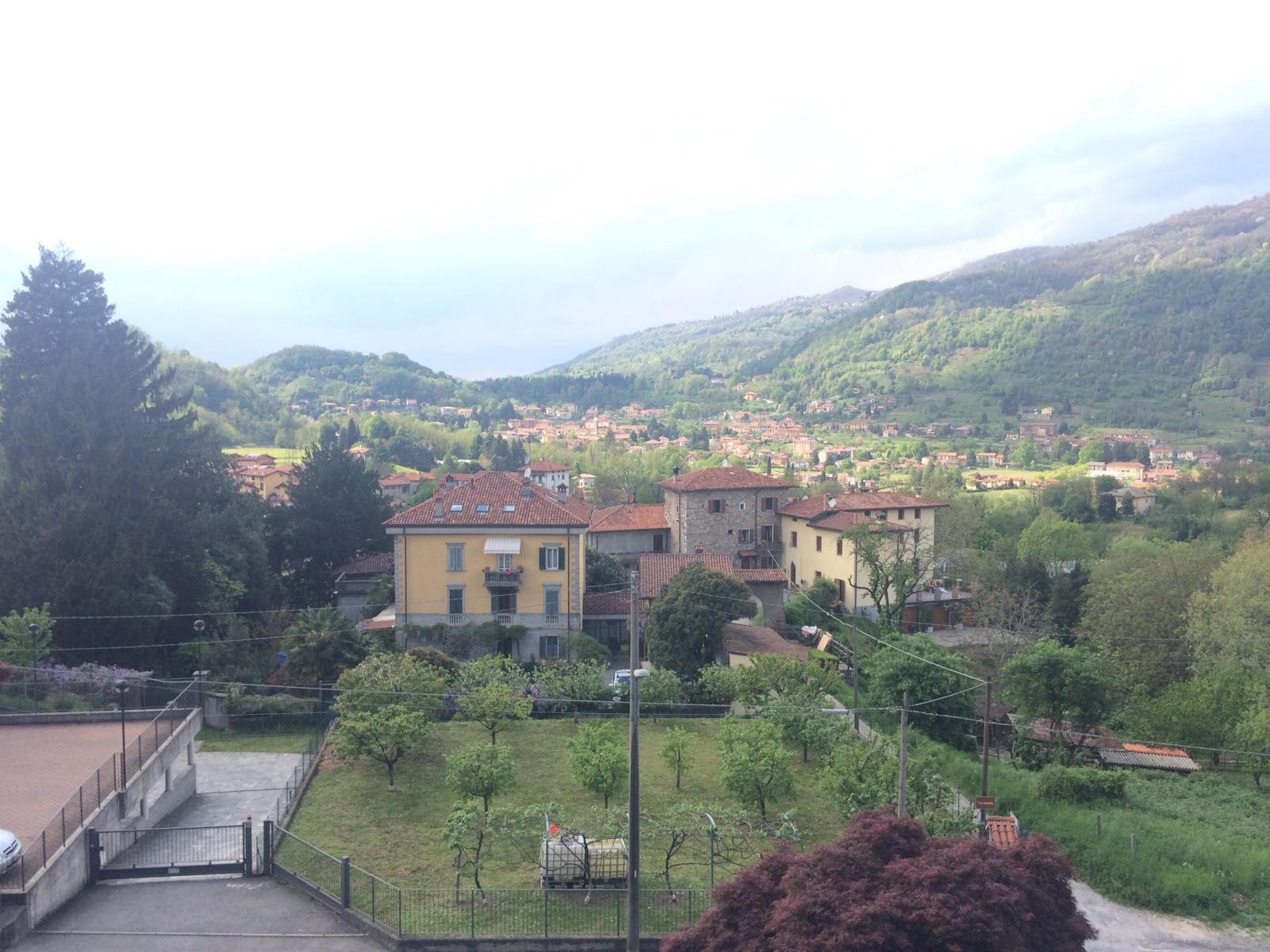 un'immagini rapresentante il panorama di Calco